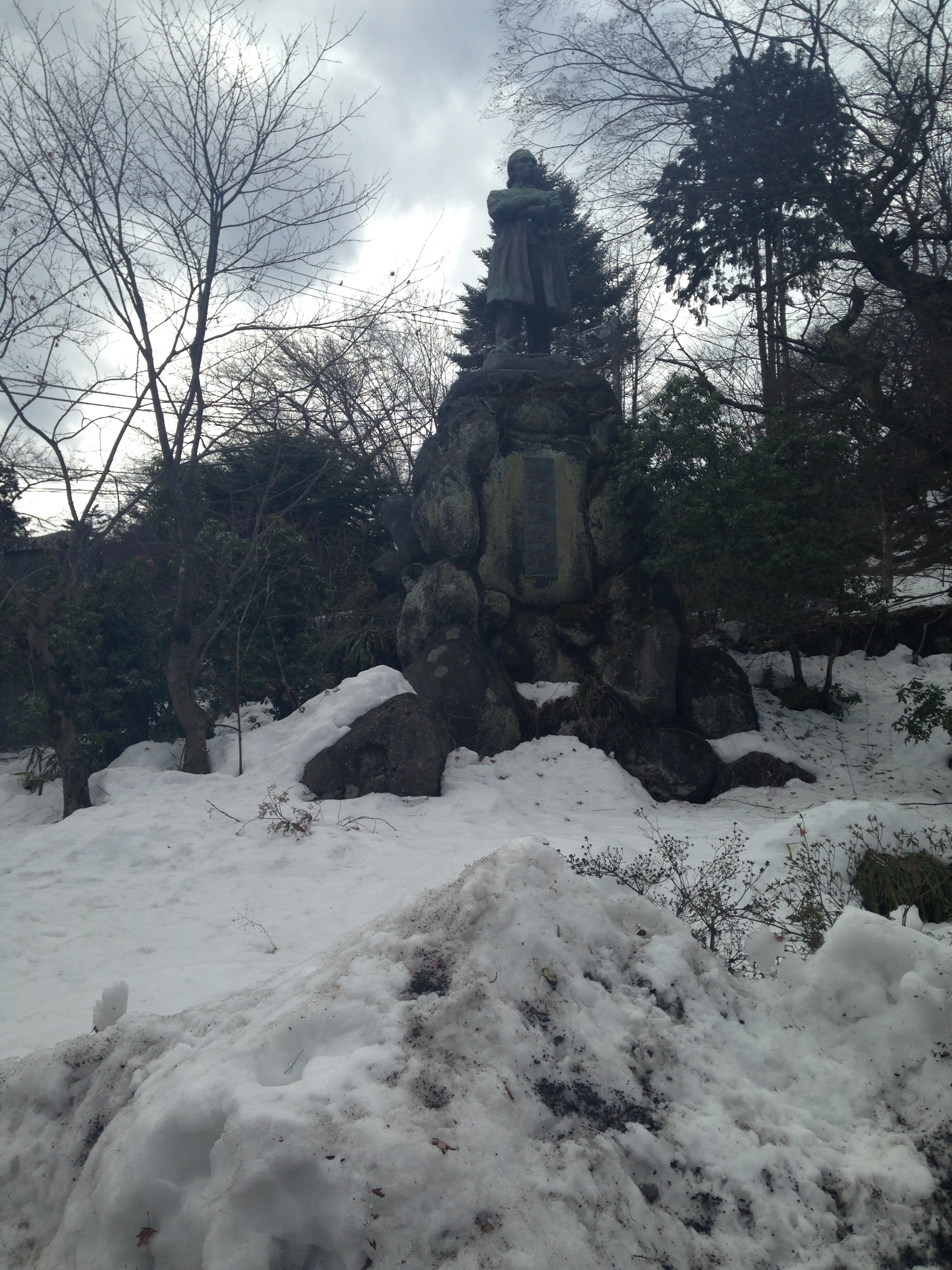 日光橋付近にある板垣退助の像